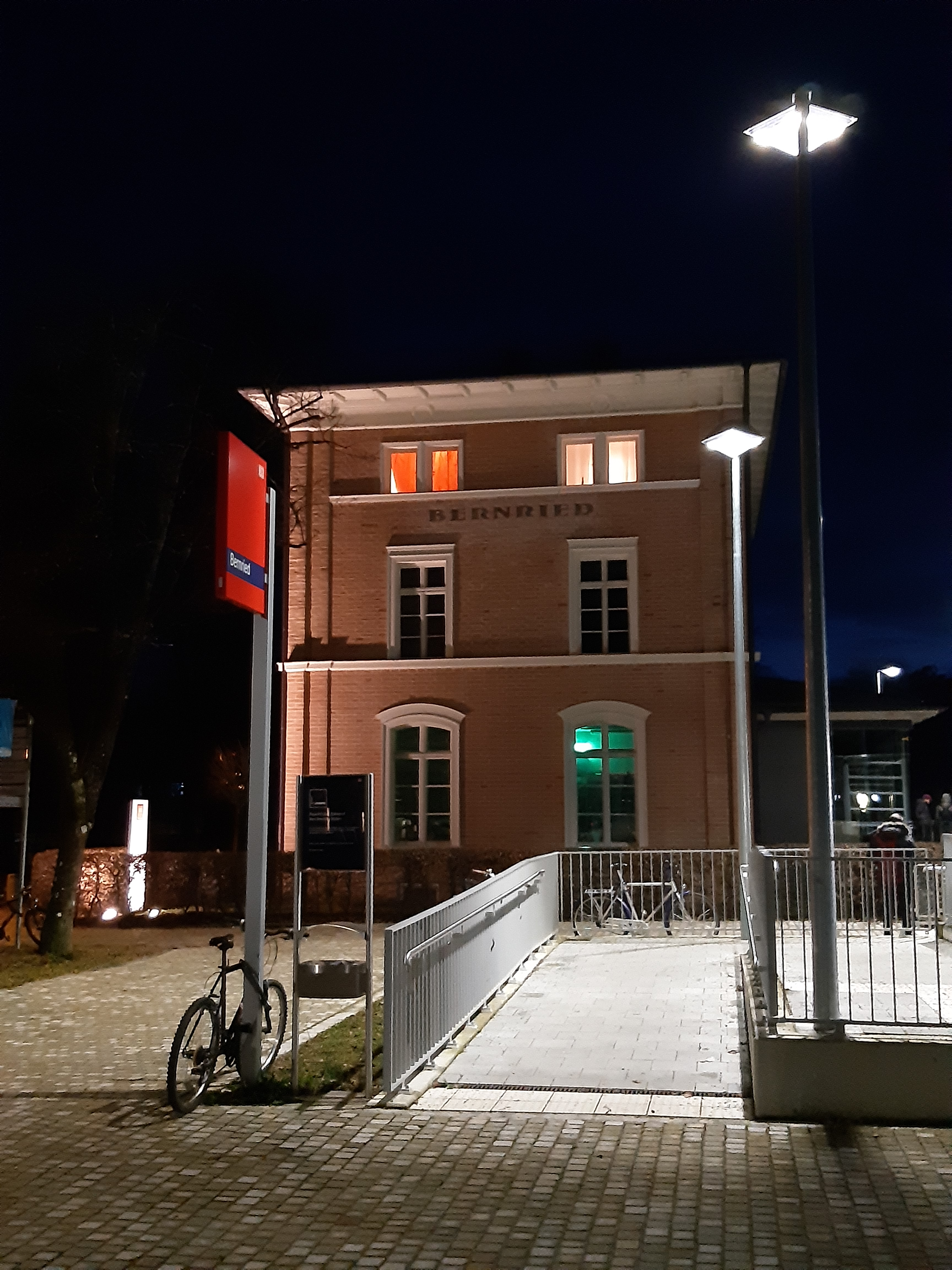 Bahnhof Bernried